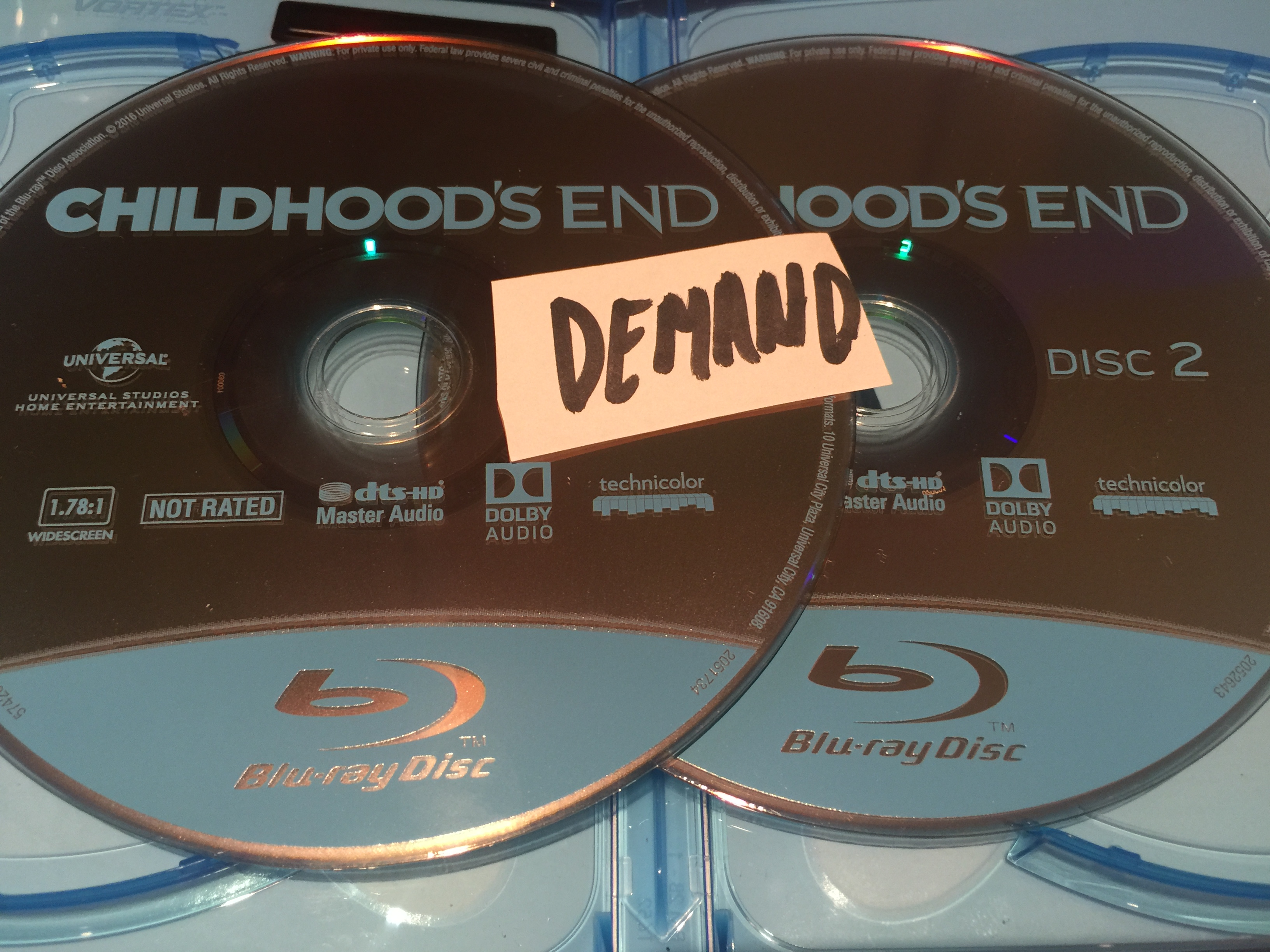 Ceci est un exemple de proof (provenant de la team DEMAND).